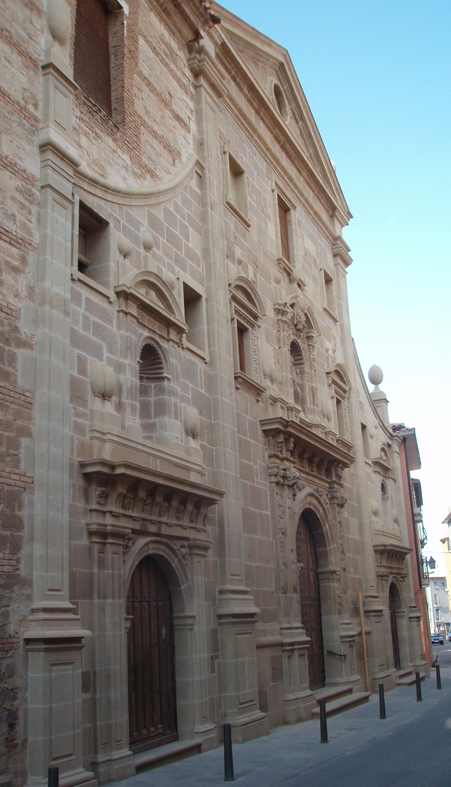 Iglesia y Convento de las Dominicas de Tudela, en 2008